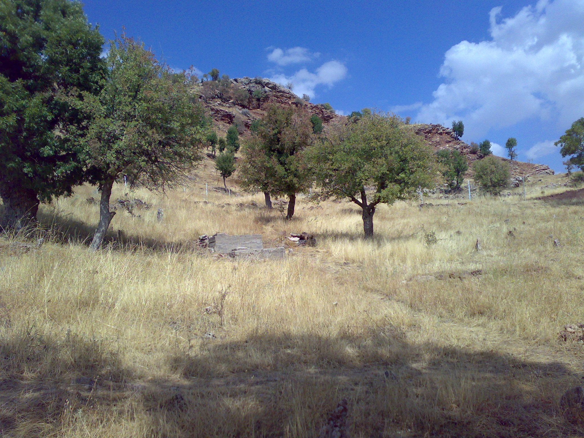 Adıyaman merkeze bağlı Sakallı köyünden bir görüntü.